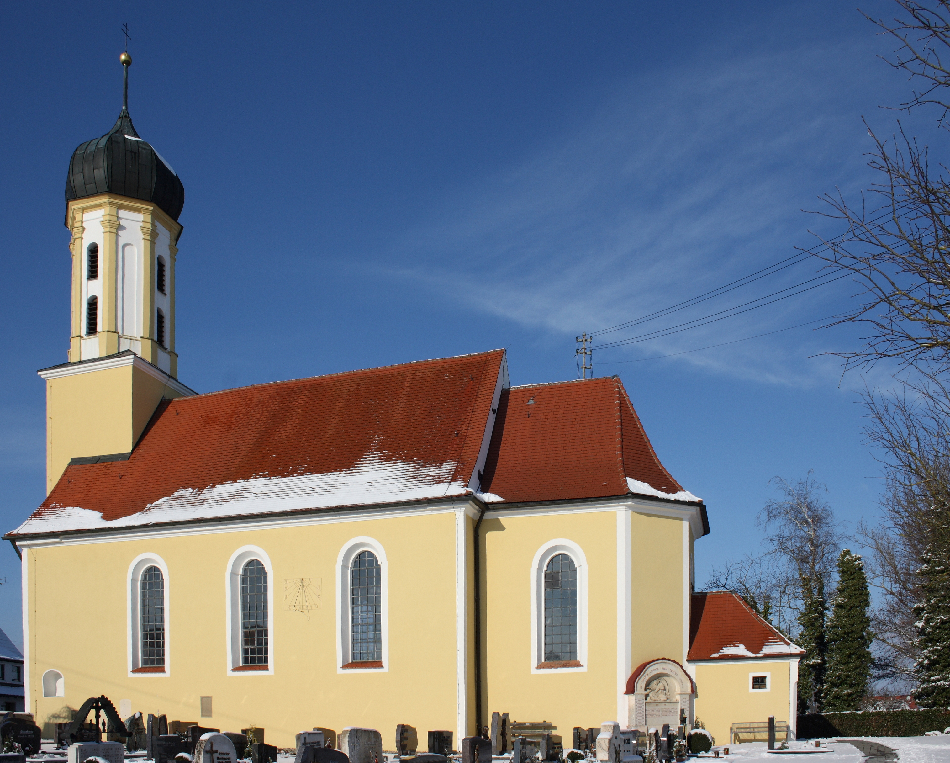 Katholische Pfarrkirche St. Peter in Burghagel, einem Ortsteil der Gemeinde Bachhagel im Landkreis Dillingen an der Donau (Bayern)